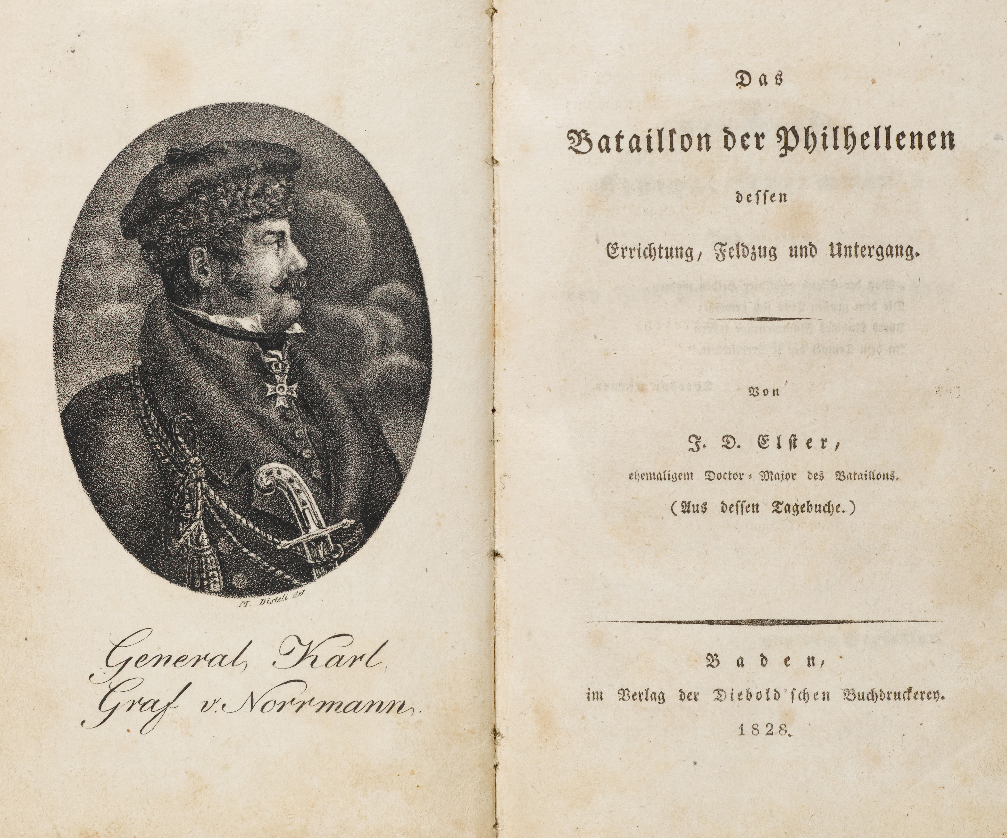 Titellithographie von M. Disteli mit Portrait von Karl von Normann-Ehrenfels und Titelseite von: Johann Daniel Elster: Das Bataillon der Philhellenen dessen Errichtung, Feldzug und Untergang. Baden, Diebold, 1828.